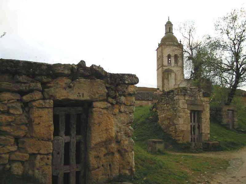 Fotografia de las bodegas de Zazuar con la Iglesia de San Andres al fondo.